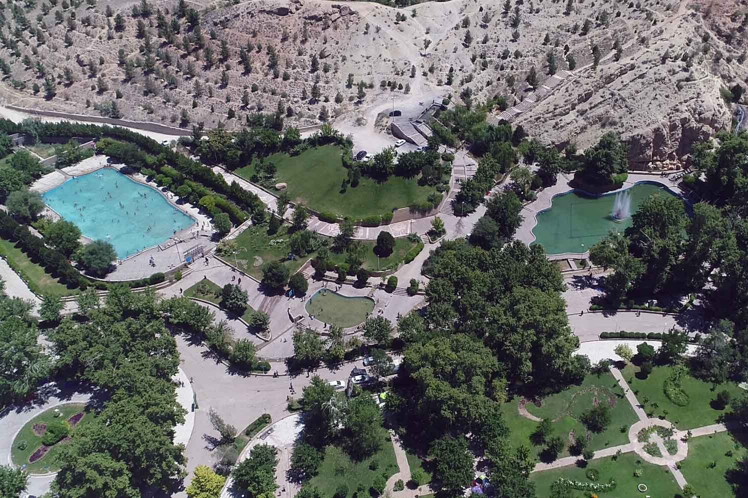 استخر طبیعی پارک ملی بش قارداش